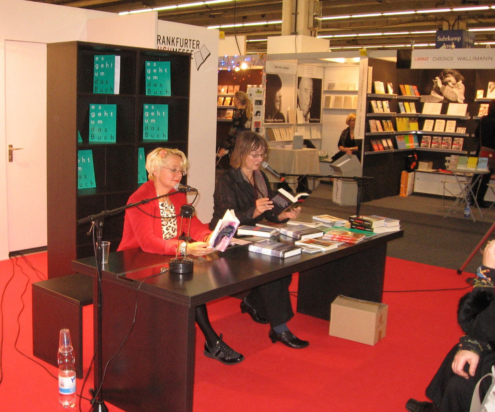 Claudia Gehrke (rechts) bei einer Lesung Buchmesse in Frankfurt 2009.